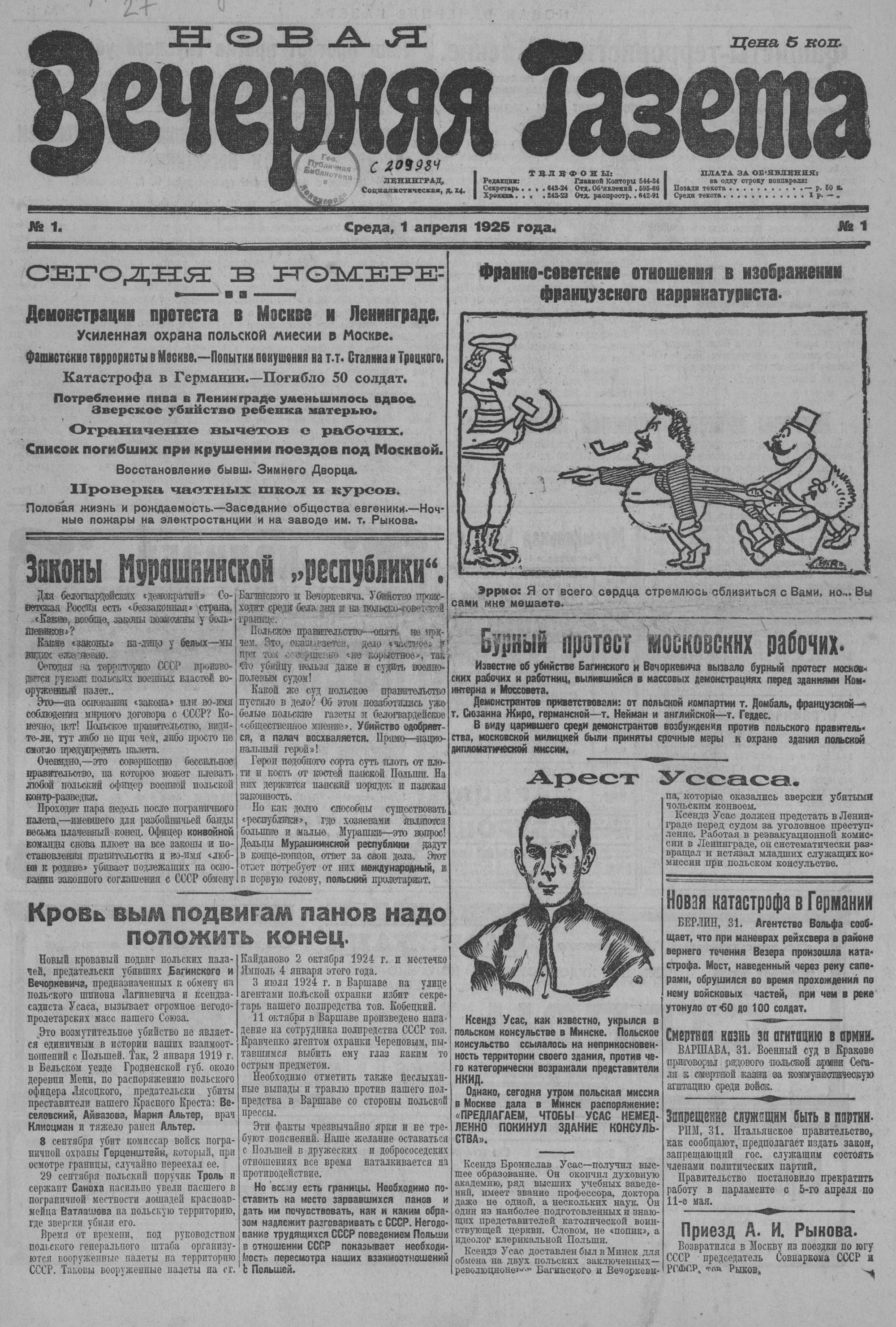 Первый выпуск «Новой вечерней газеты», от 1 апреля 1925 года